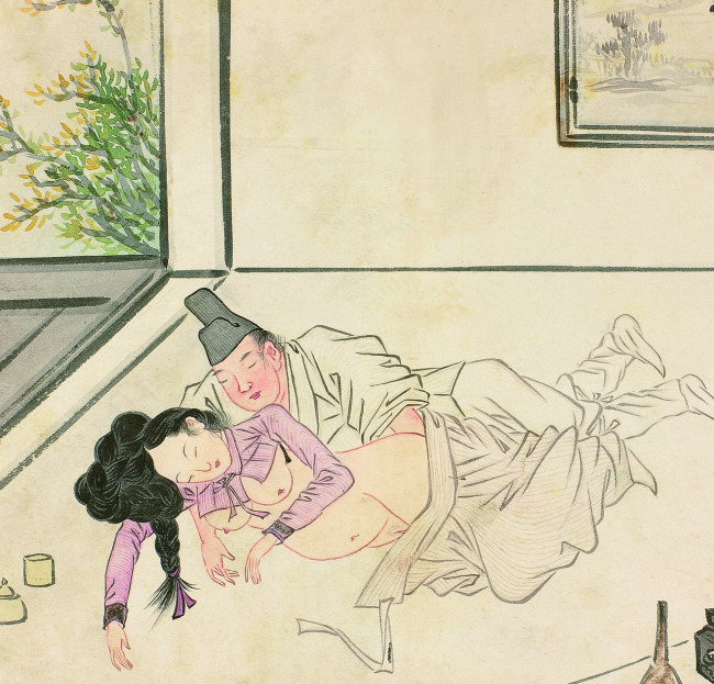 中文（香港）: 申潤福《乾坤一會帖》